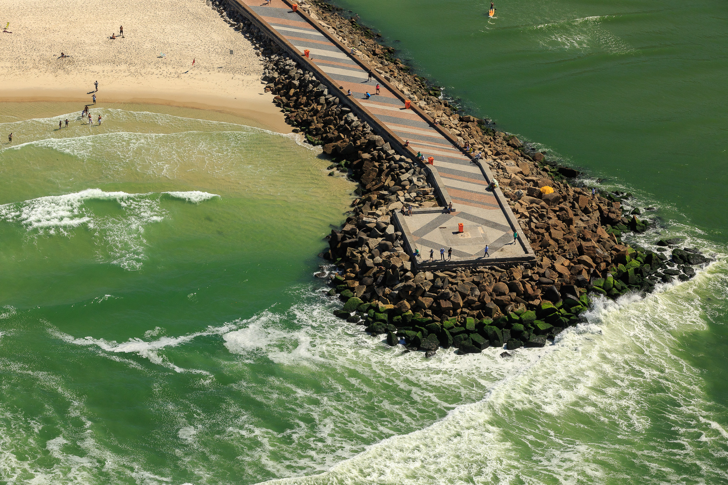 Vista aérea do Quebra Mar, localizado na Barra da Tijuca na cidade do Rio de Janeiro